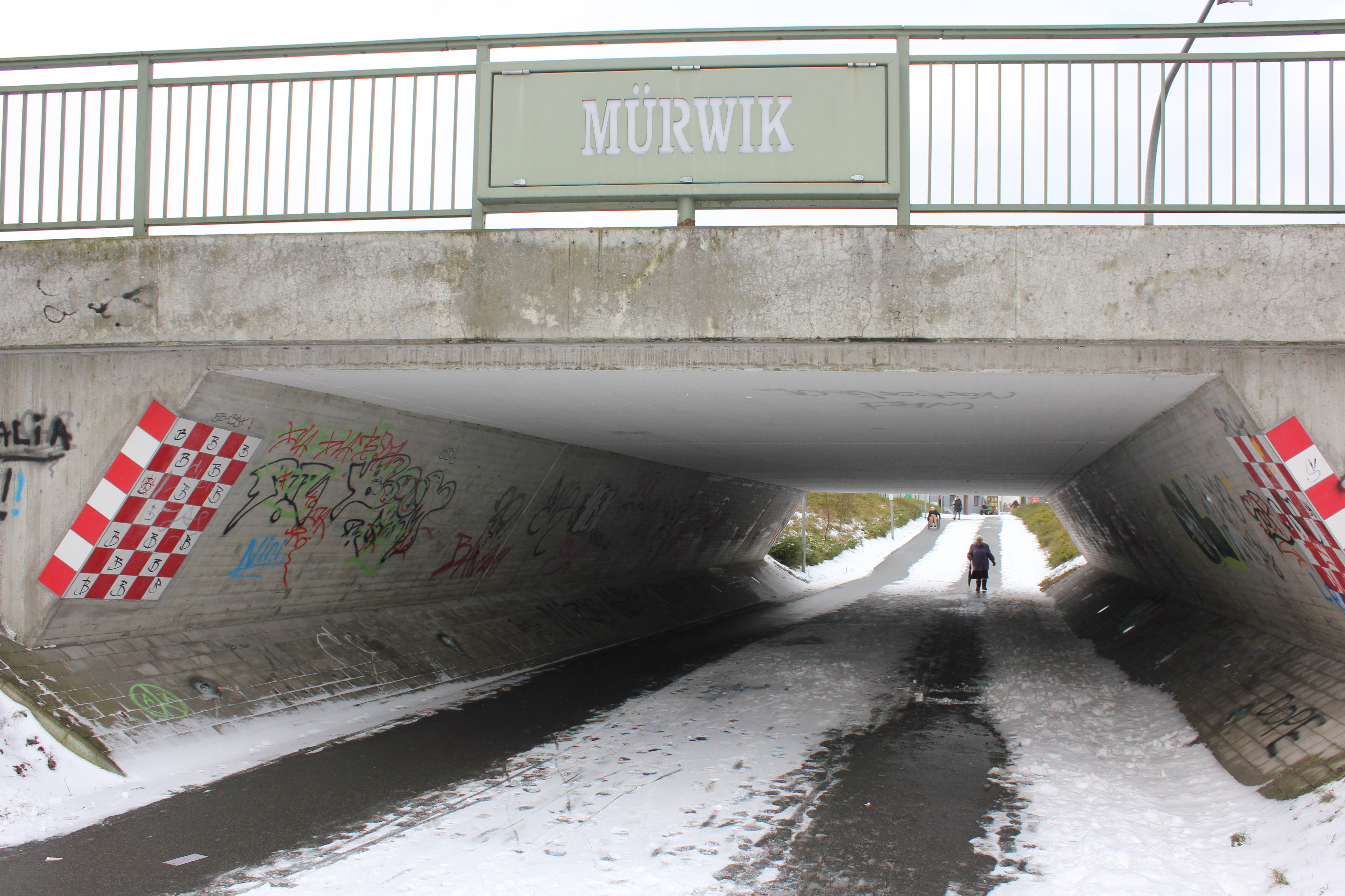 Fußgängerunterführung unter Nordstraße von Engelsby nach Mürwik (beim Stadtbezirk Wasserloos), Schild Mürwik (Januar 2014)